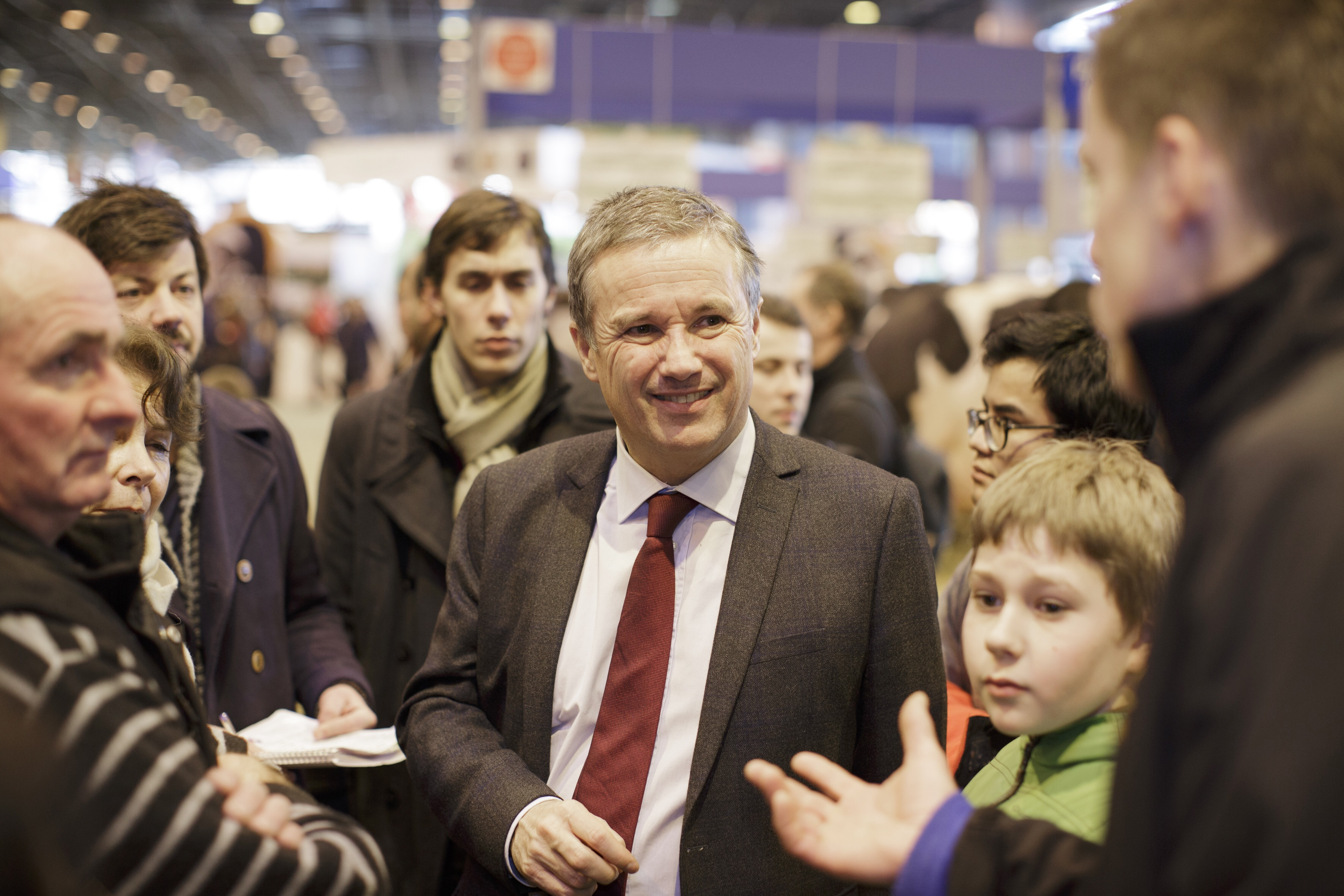 Nicolas Dupont-Aignan au Salon de l'Agriculture le 23 février 2015